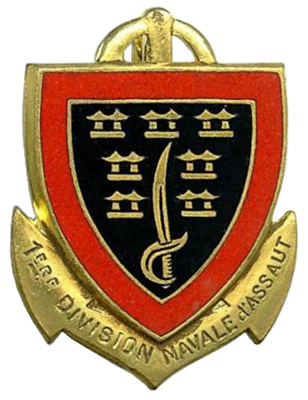 Insigne de la 1ère division navale d'assaut en indochine